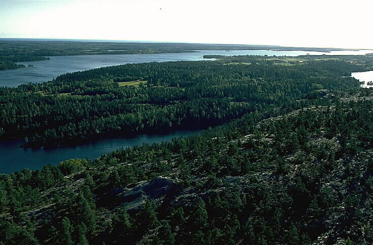 Sjöarna Ärr och Ånimmen i Fröskogs och Ånimskogs socknar, Hesselboms motiv för tavlan "Vårt land". Bilden troligen från omkring 1980. Motiv: Ånimskog Nyckelord: Flygbilder Kategori: Insjömiljöer Sjöarna Ärr och Ånimmen i Fröskogs och Ånimskogs socknar, Hesselboms motiv för tavlan "Vårt land". Bilden troligen från omkring 1980.